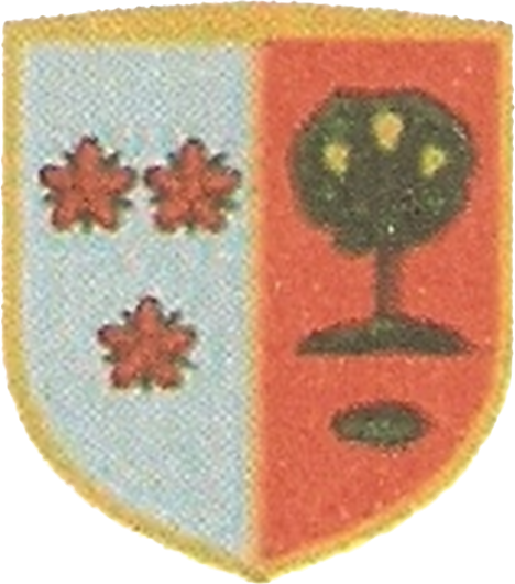 Escudo del Concejo de Gazólaz.